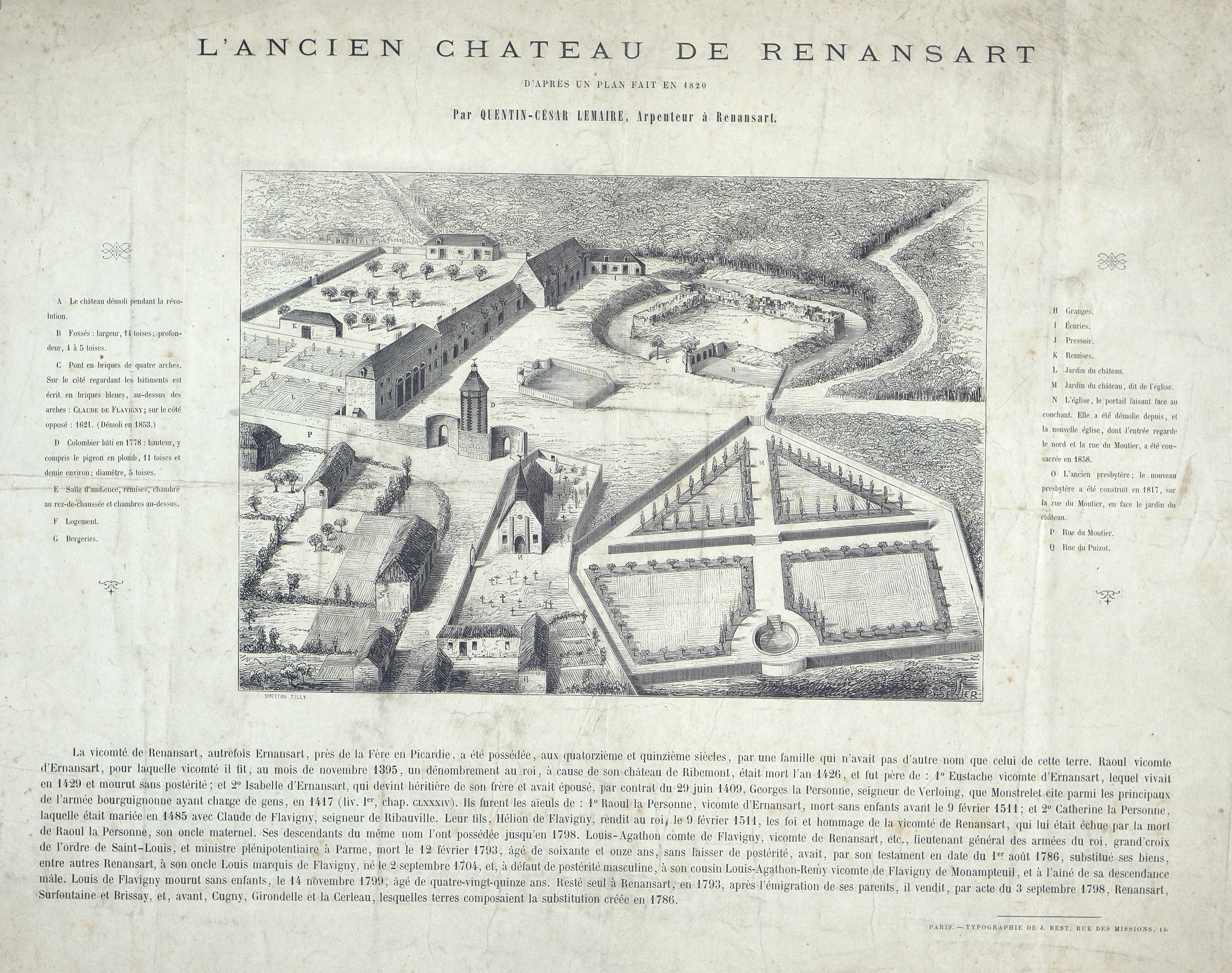 L'ancien château de Renansart d'après un plan fait en 1820. Ce château situé dans l'Aisne a été détruit au début du XIXe siècle. Il appartenait à la famille de Flavigny.